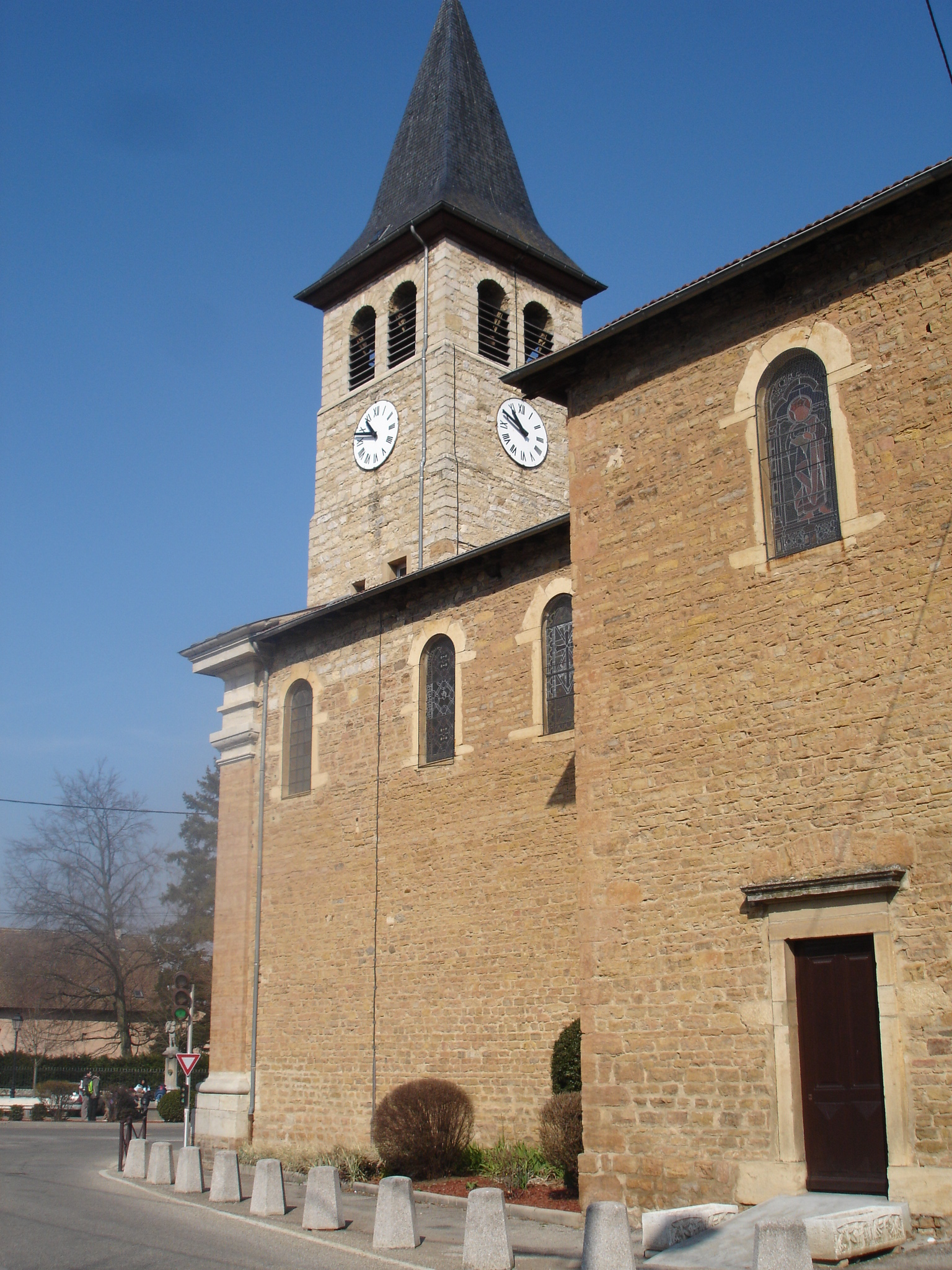 Chamagnieu : Le clocher de l'église